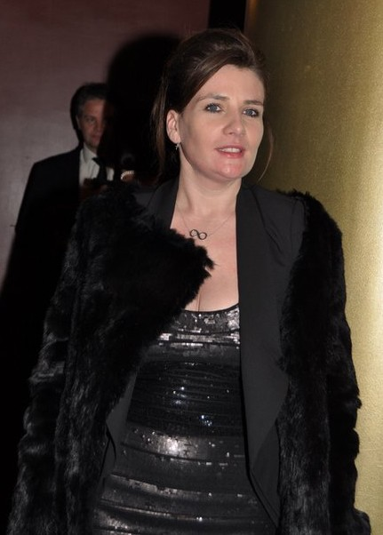 Marie-Amélie Seigner à la cérémonie des étoiles d'or du cinéma français